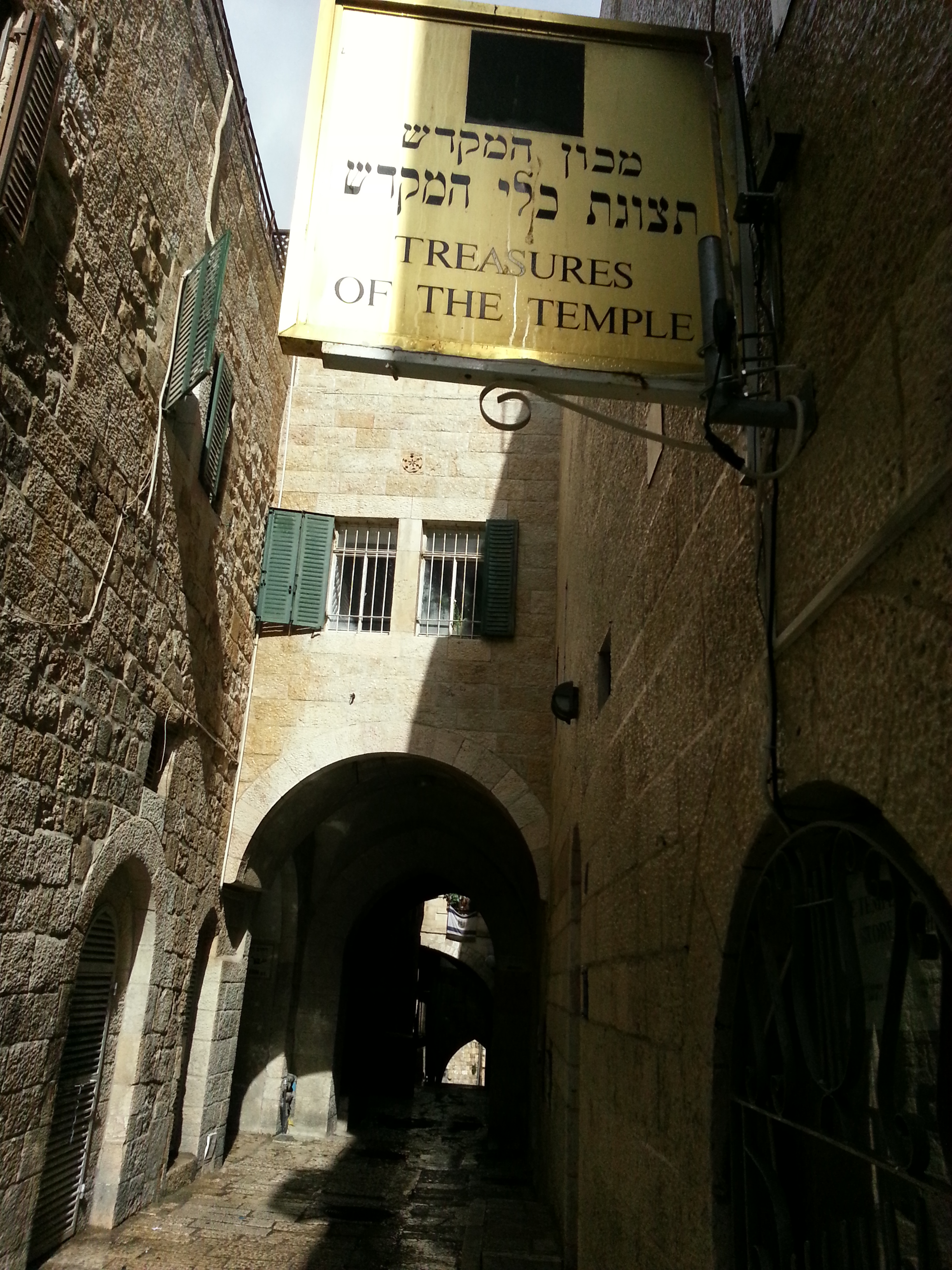 מראה בעיר העתיקה בירושלים